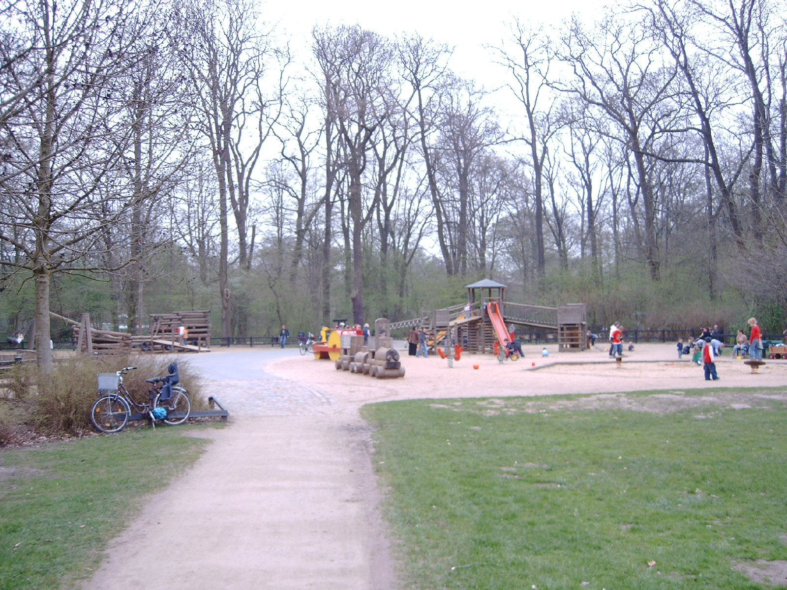 גן השעשועים בירגרפארק בגרמניה - מגוון מתקנים בשילוב עץ ופלסטיק.